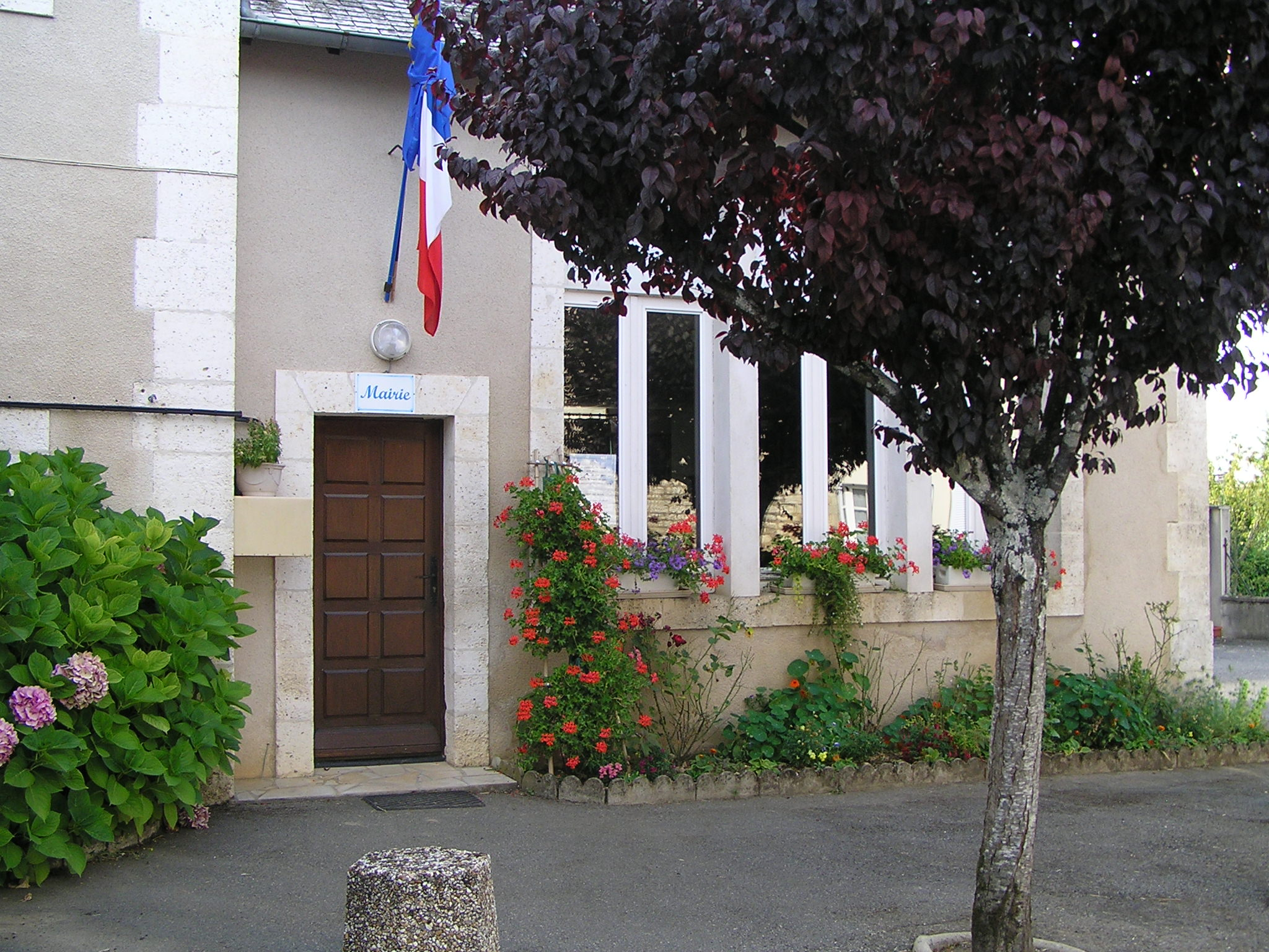 mairie de Raix